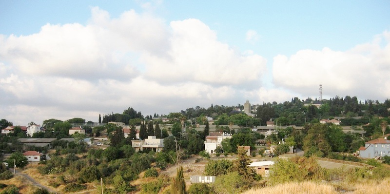 Panorama_to_judea_valley